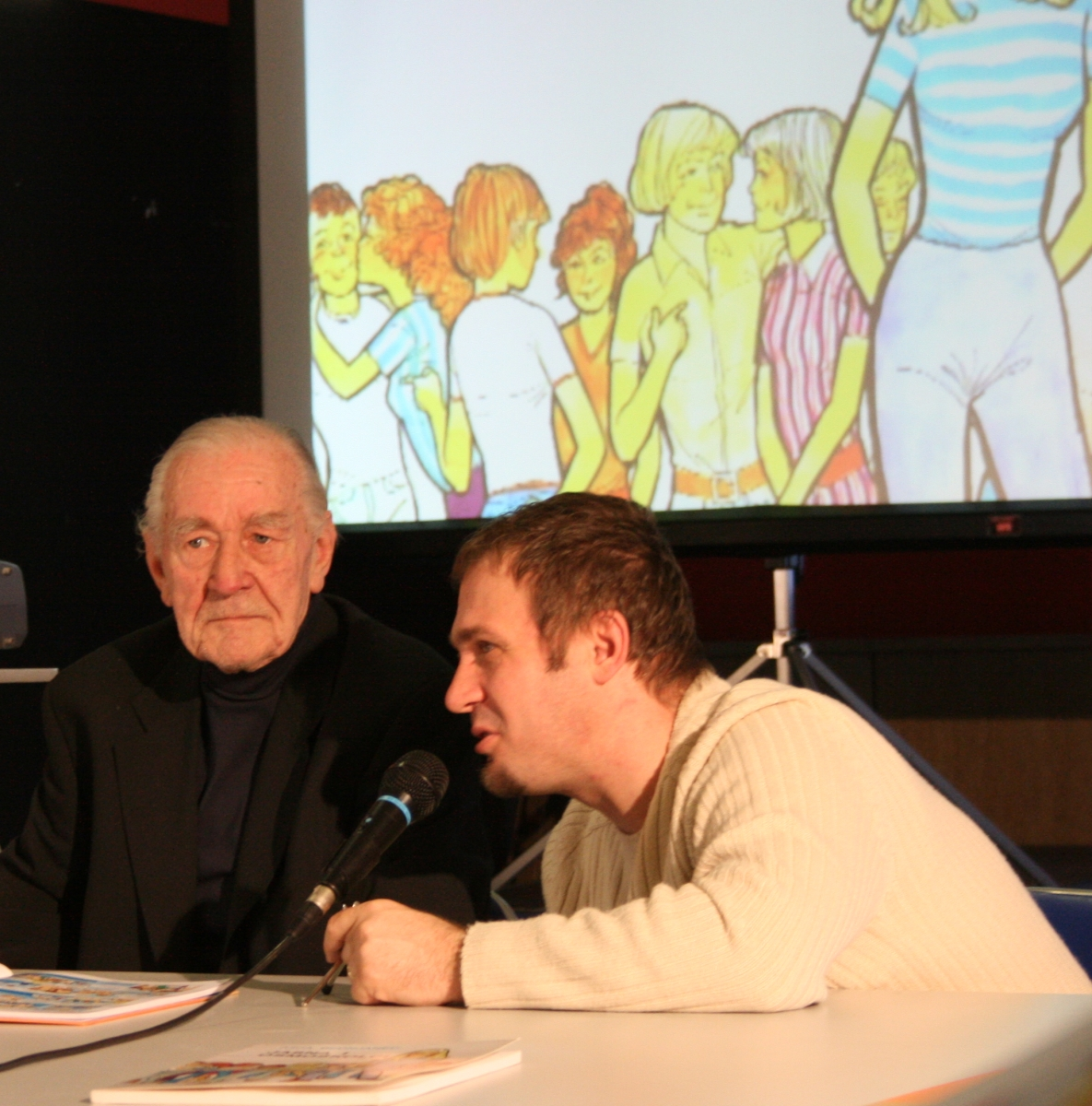 Ivica i Darko Bednjanec na CRŠ-u 2008. u Zagrebu